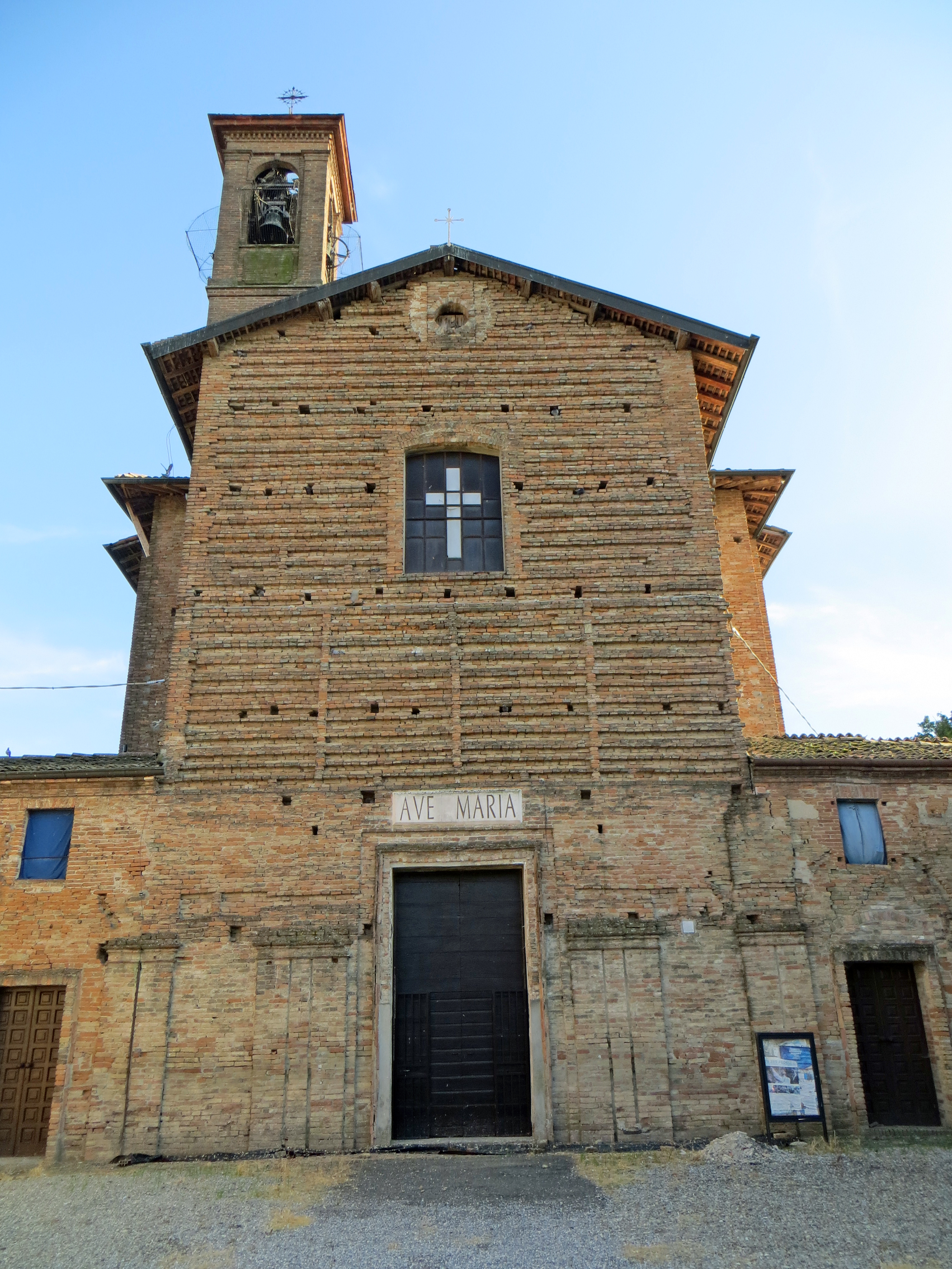 Santuario della Madonna dei Prati (Madonna dei Prati, Busseto) - facciata